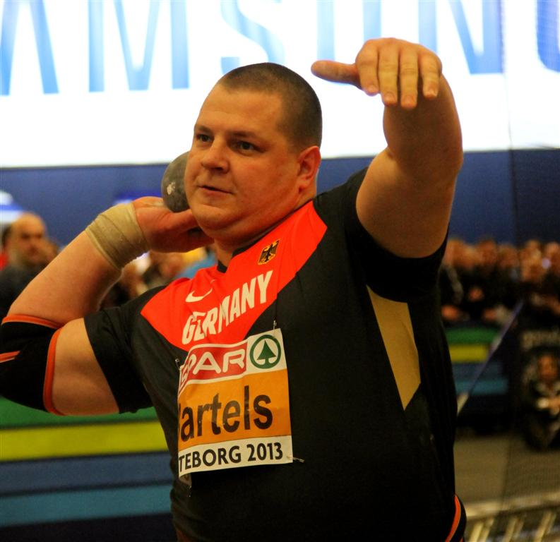 044 bartels